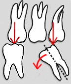 Statik bei fehlendem, gekippten Molaren